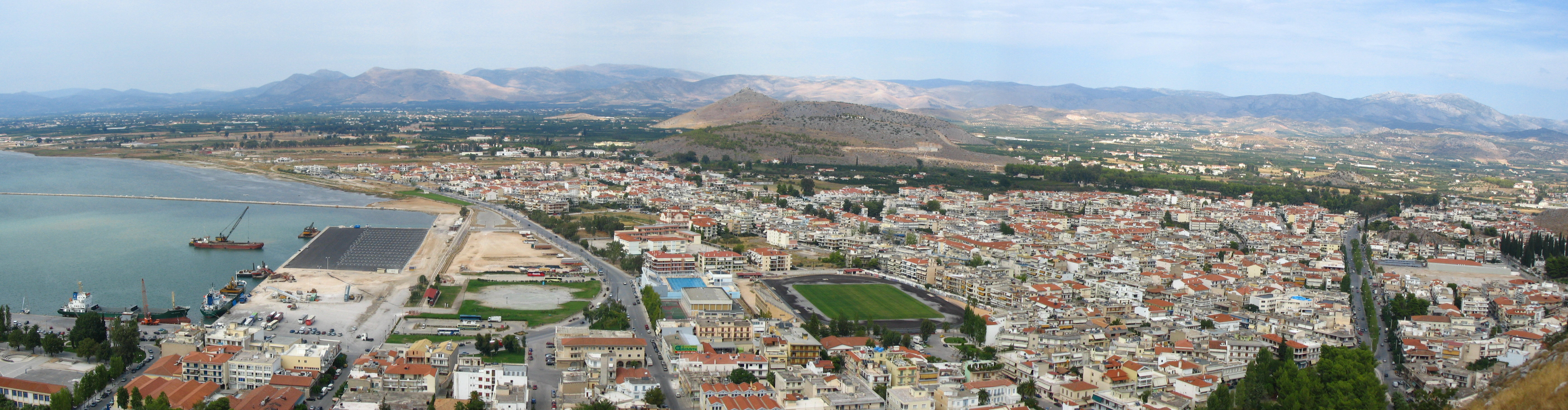 Панорама Нафплиона из крепости Паламиди